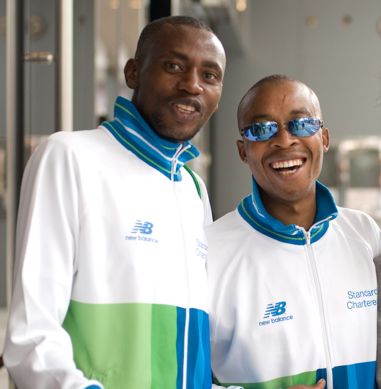 Joseph Kibunja and Henry Wanyoike in Hong Kong